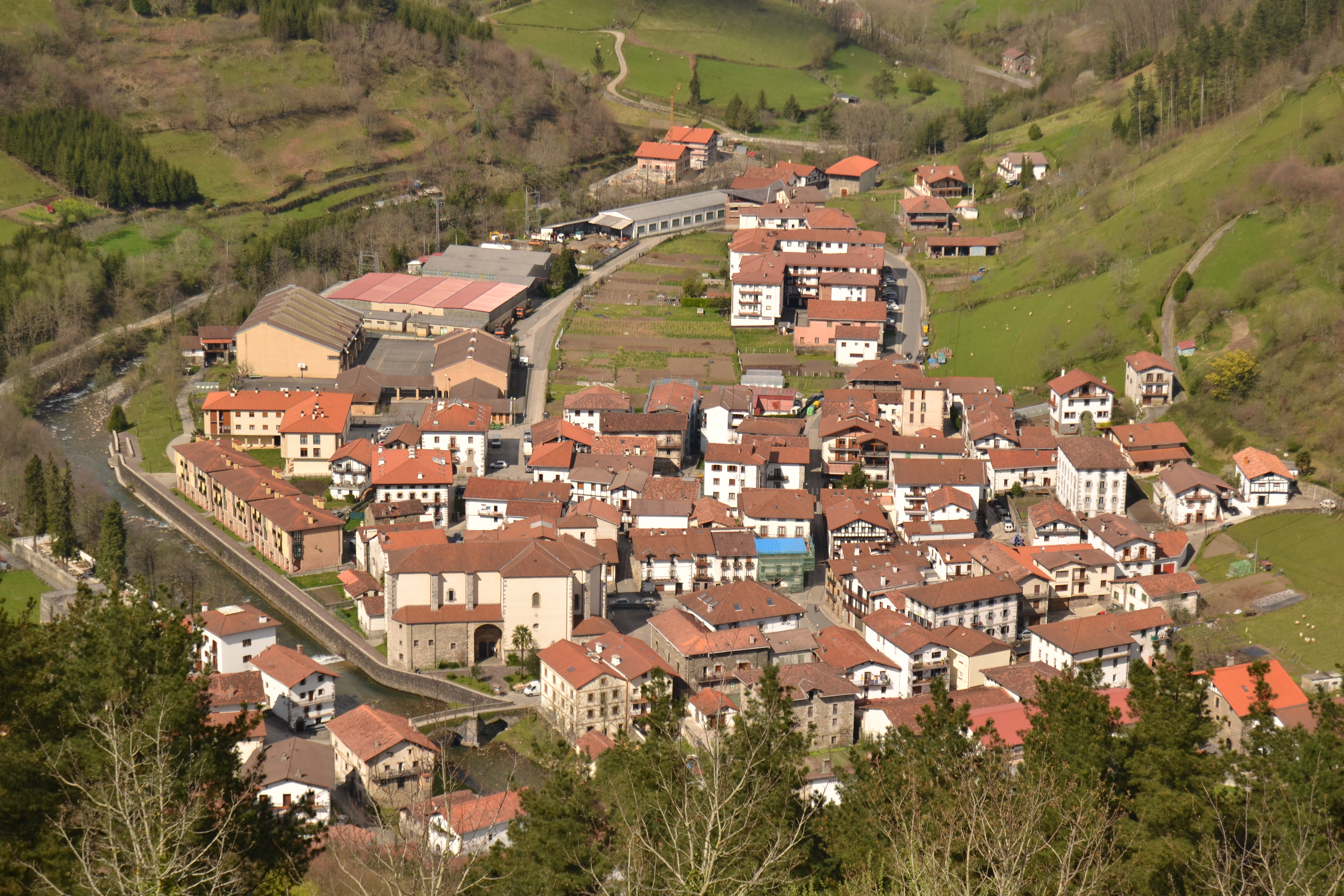 Goizueta. Nafarroa, Euskal Herria. Goizueta. Navarre, Basque Country.